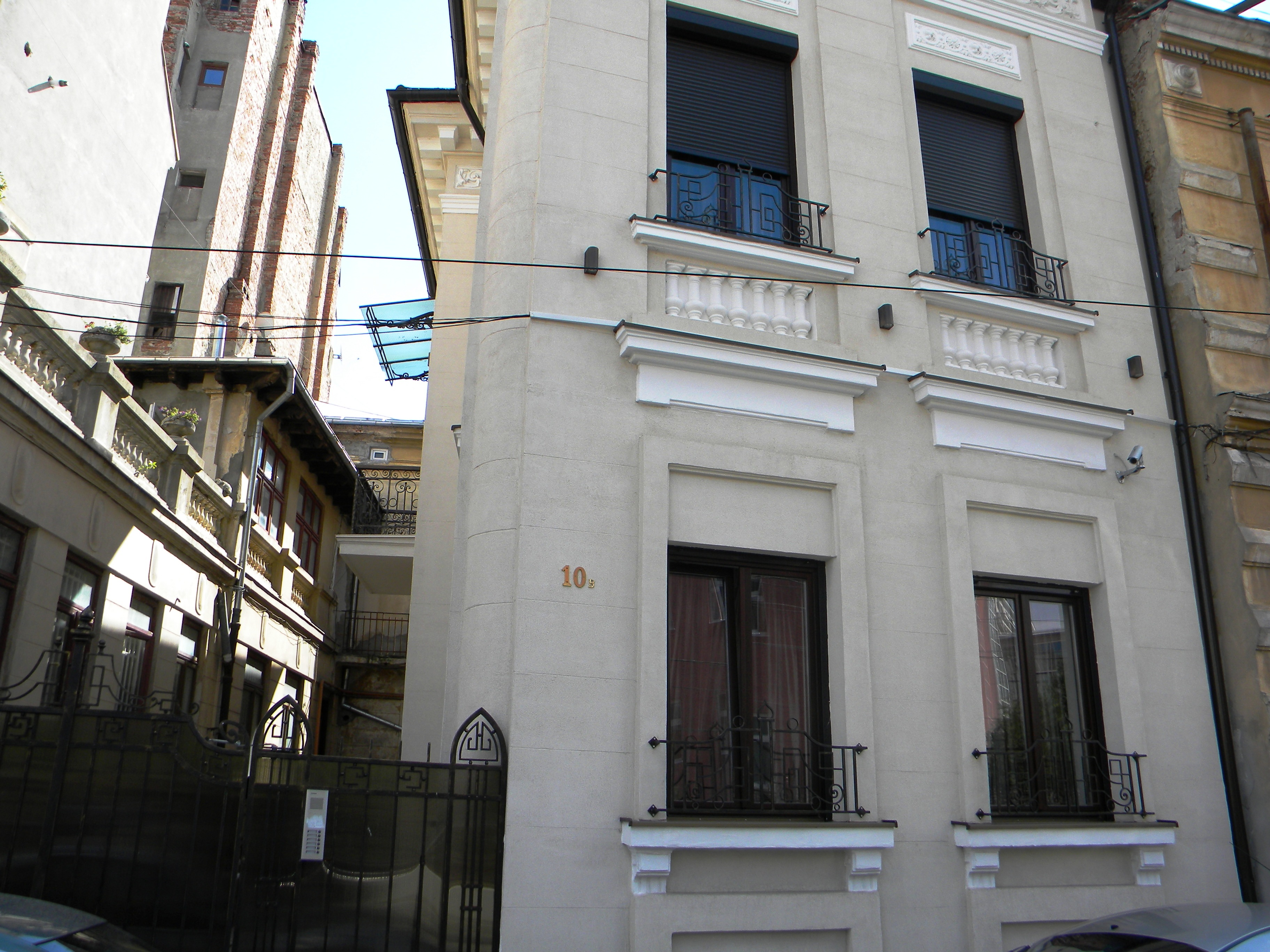 Bucuresti, Romania, Casa pe Str. Slanic nr. 10b, sect. 3